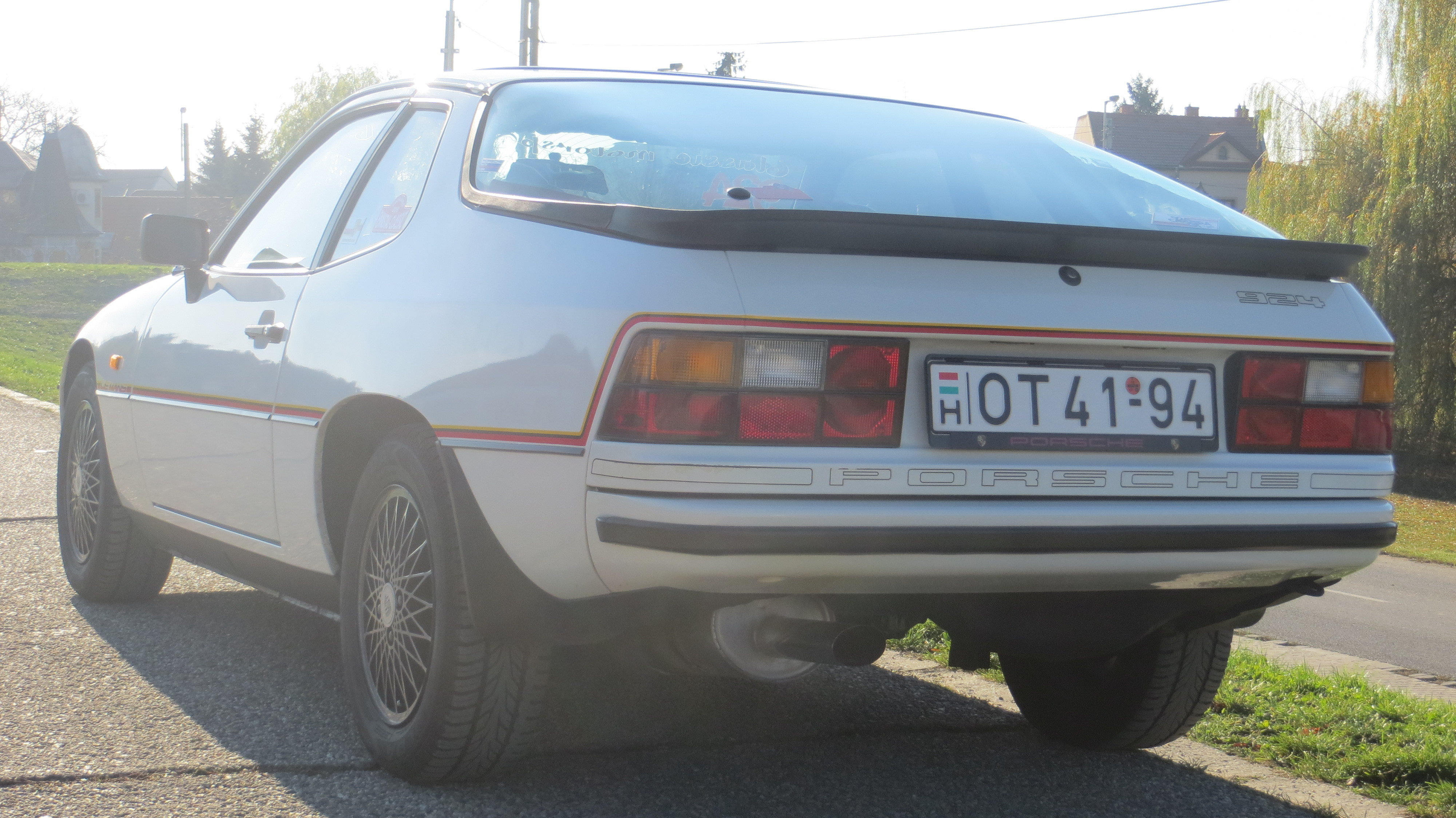 Ez a különleges modell a Porsche Le Mans-i 24 órás autóversenyeken elért hatalmas sikerei előtti tisztelgés. Összesen 1002 darab (más források szerint 1030) épült a modellből, mindegyik alpesifehér színben, körbefutó sárga-fekete-vörös díszítő csíkkal, az első sárvédőkön ugyanilyen színű Le Mans felirattal. A modellen a 924 Turbo hátsó spoilere van, 6J×15-ATS Turbo-Look keréktárcsák, belül csíkos „Nadelstreifen” kárpitozású Turbo ülések fehér szegéllyel, 36 cm átmérőjű négyküllős bőrkormány, bőr váltógomb, az ajtóküszöbön fekete alapon fehér 924 felirat. A gépkocsihoz többféle extrát is lehetett rendelni, elektromos ablakot, elektromosan állítható külső tükröket, hátsó ablaktörlőt, fényszórómosót, légkondicionálót és kivehető targatetőt is. Jobbkormányos kivitelben 100 darab készült.